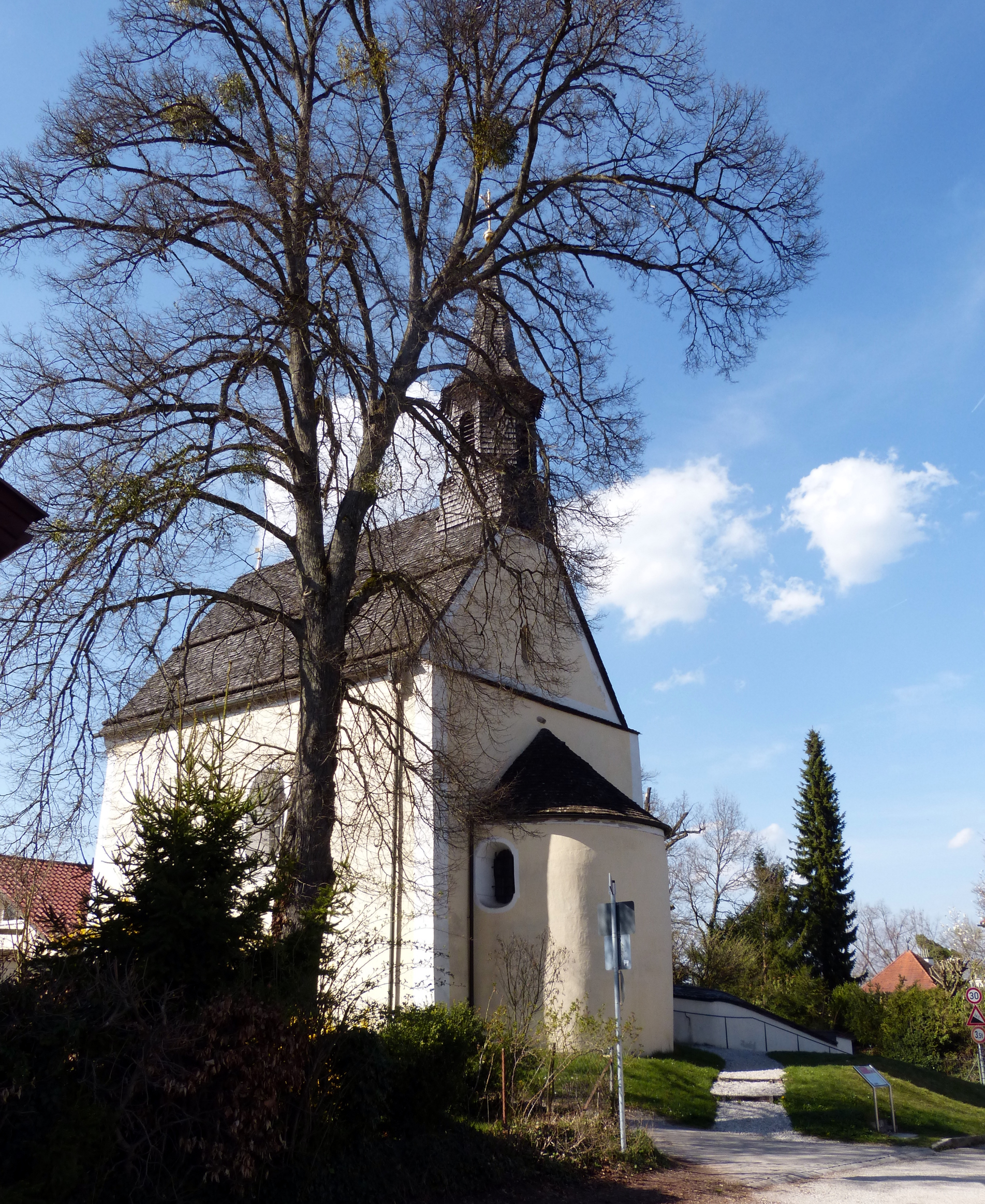 Berg am Starnberger See, Kirche St. Johann Baptist. Der Ursprung der katholischen Filialkirche liegt wahrscheinlich im 12. Jahrhundert. Die innere Ausstattung wurde 1658/59 umgestaltet, der Dachreiter 1867 aufgesetzt.